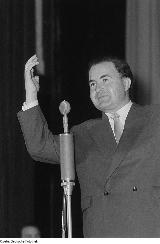 Original image description from the Deutsche Fotothek Heinz Quermann bei der Festivität zum 60jährigen Bestehen der Leipziger Volkszeitung